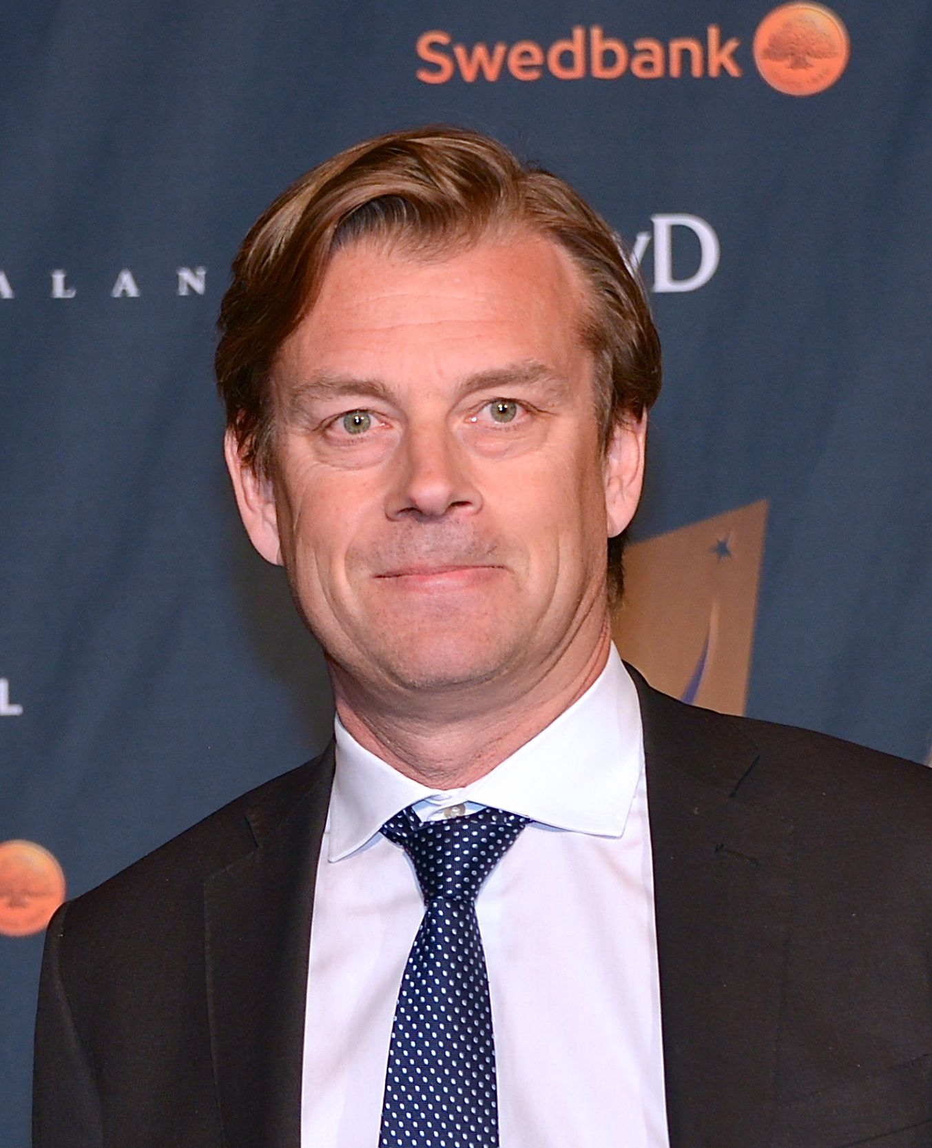 Michael Wolf på Idrottsgalan på Globen i Stockholm den 14 januari 2013.